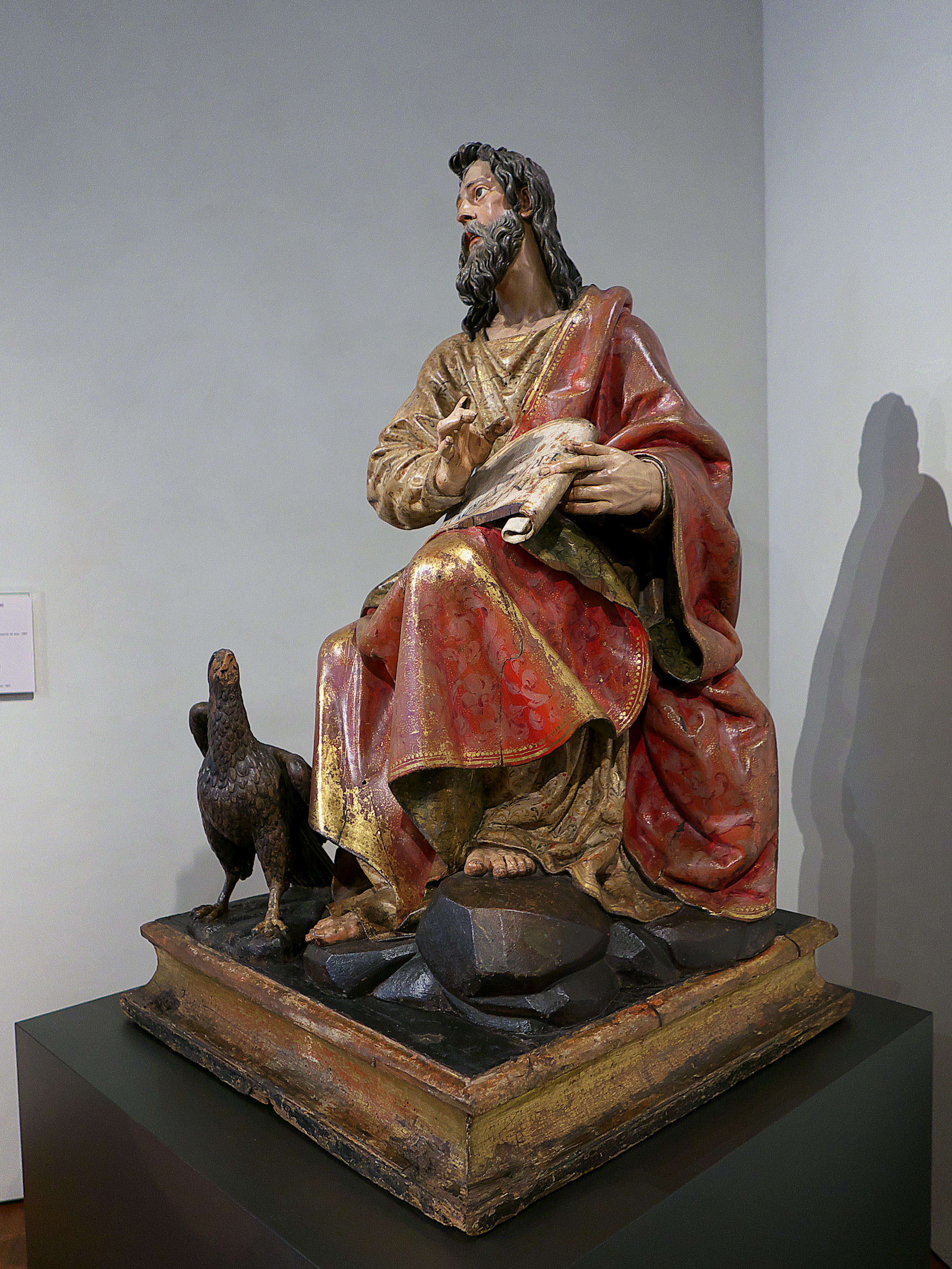 Museo Nacional de Escultura. Talla en madera policromada de San Juan Evangelista (ca 1638) en su última etapa, cuando en la isla de Patmos escribió su Apocalipsis. Destinada a un retablo en el Convento de Santa María de la Pasión (Sevilla).